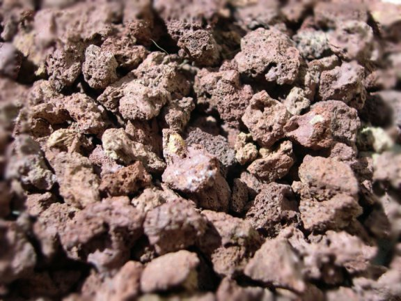 Pouzzolane